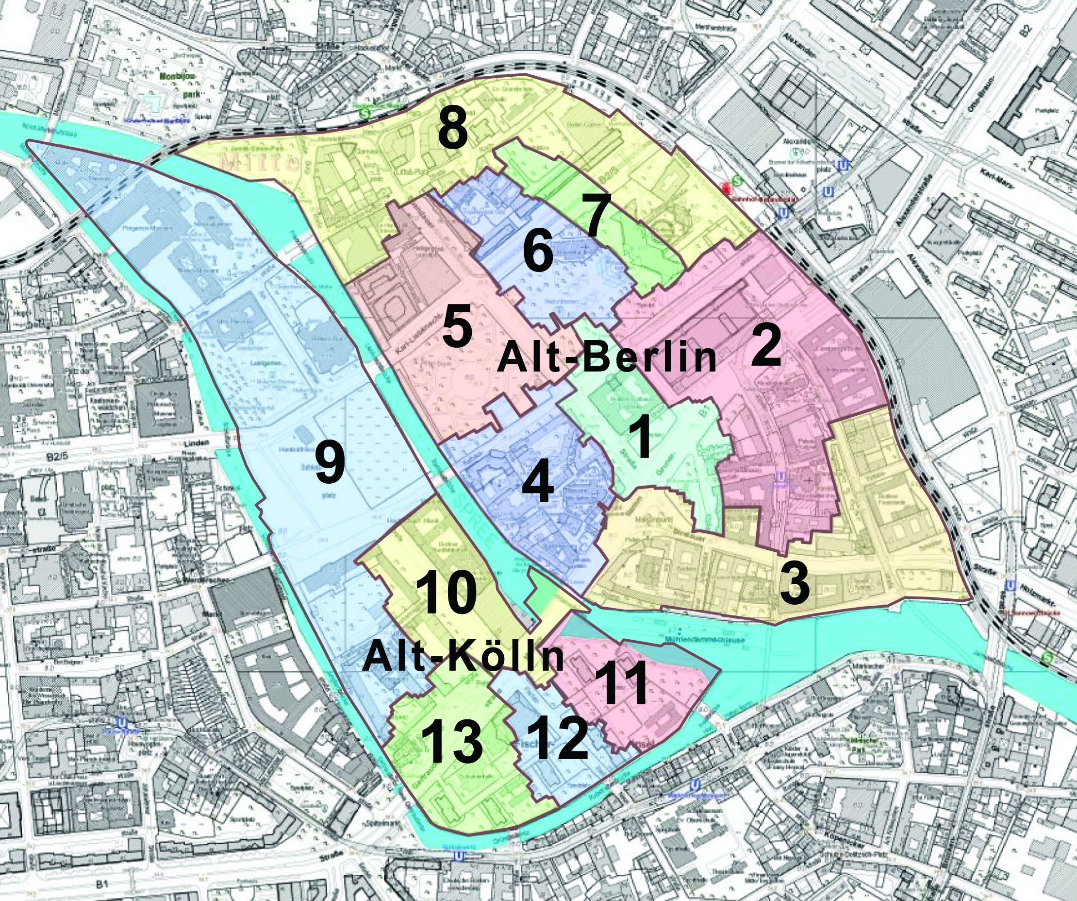 historische Stadtbezirke in Alt-Berlin und Alt-Kölln